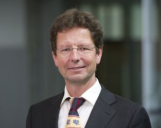 Prof. Dr. Thomas M.J. Möllers